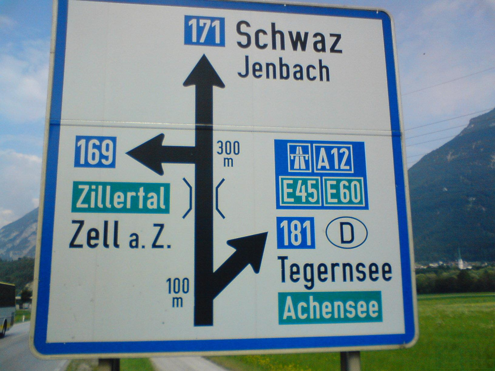 Vorwegweiser auf der B171 bei Strass Richtung Westen